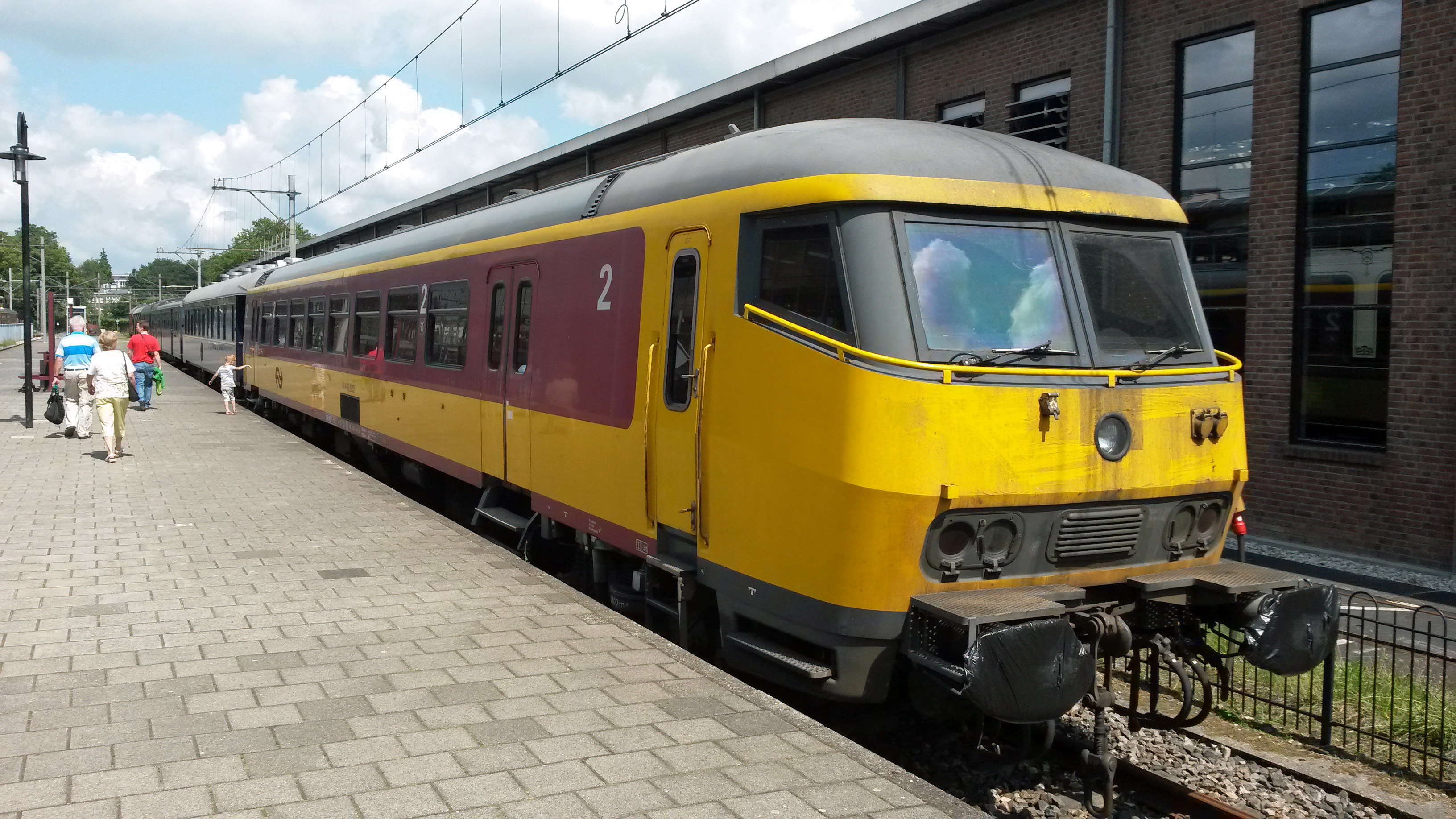 Bs Stuurstandrijtuig van de voormalige Beneluxtrein in het Nederlands Spoorwegmuseum in Utrecht.